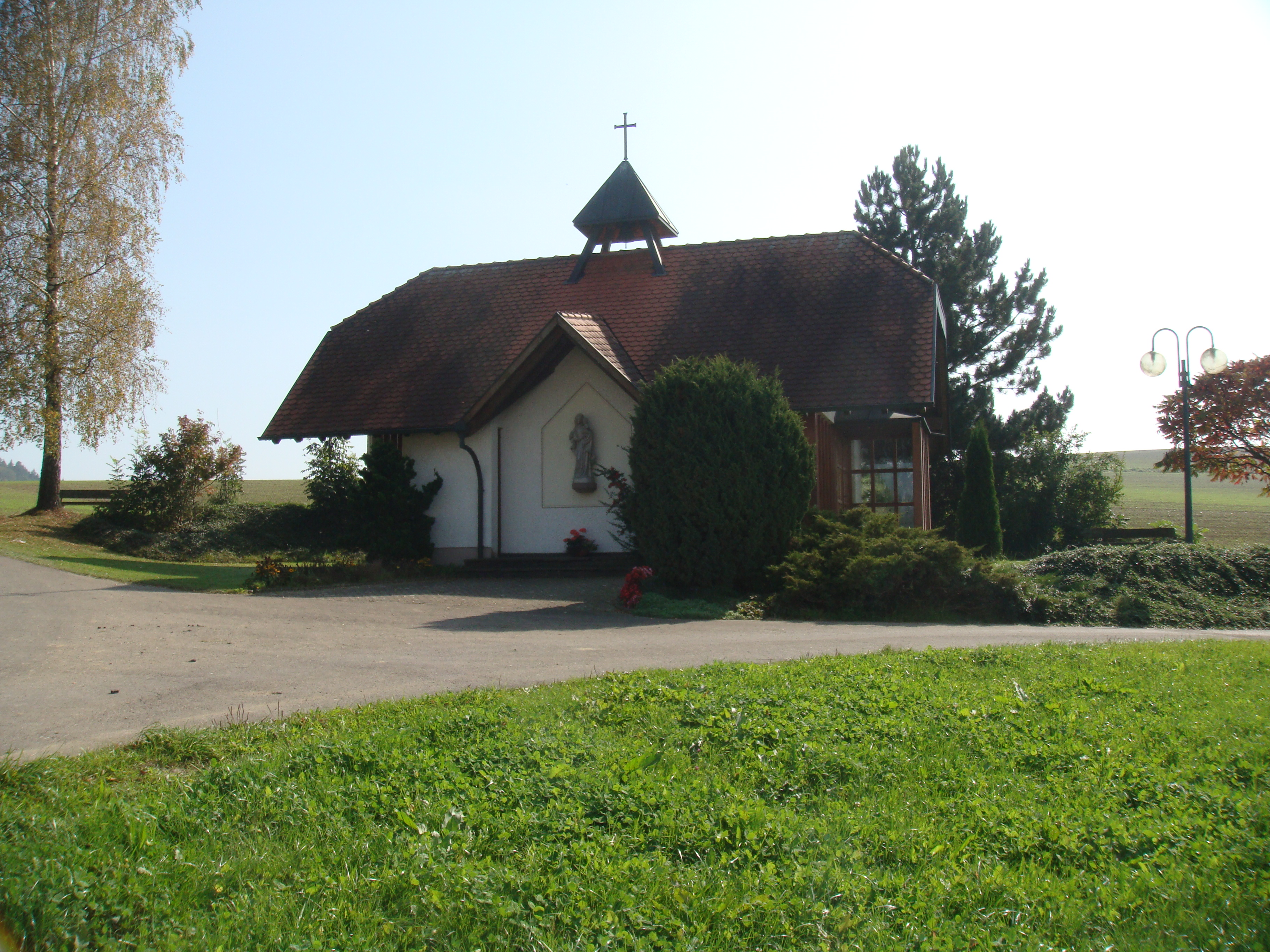 Dorfkapelle in Beuren